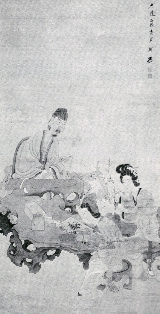 Initiation à l'art, rouleau en hauteur, encre et couleurs sur soie, 91,5x46,3, du peintre chinois Chen Hongshou, (1598-1652) Université de Californie à Berkeley, Art Museum.